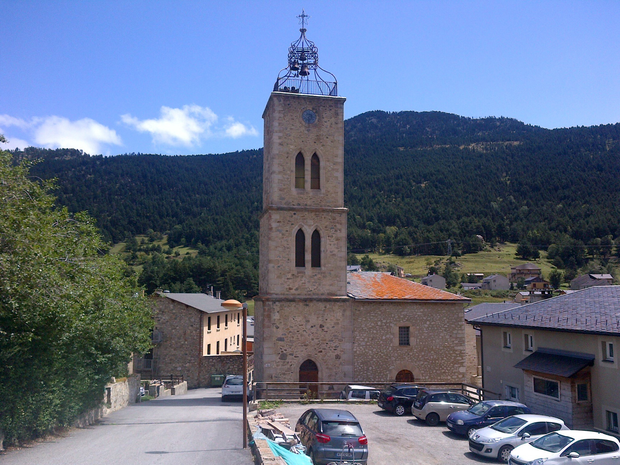 Església de Santpere de Matamala, municipi de la comarca del Capcir a la Catalunya Nord